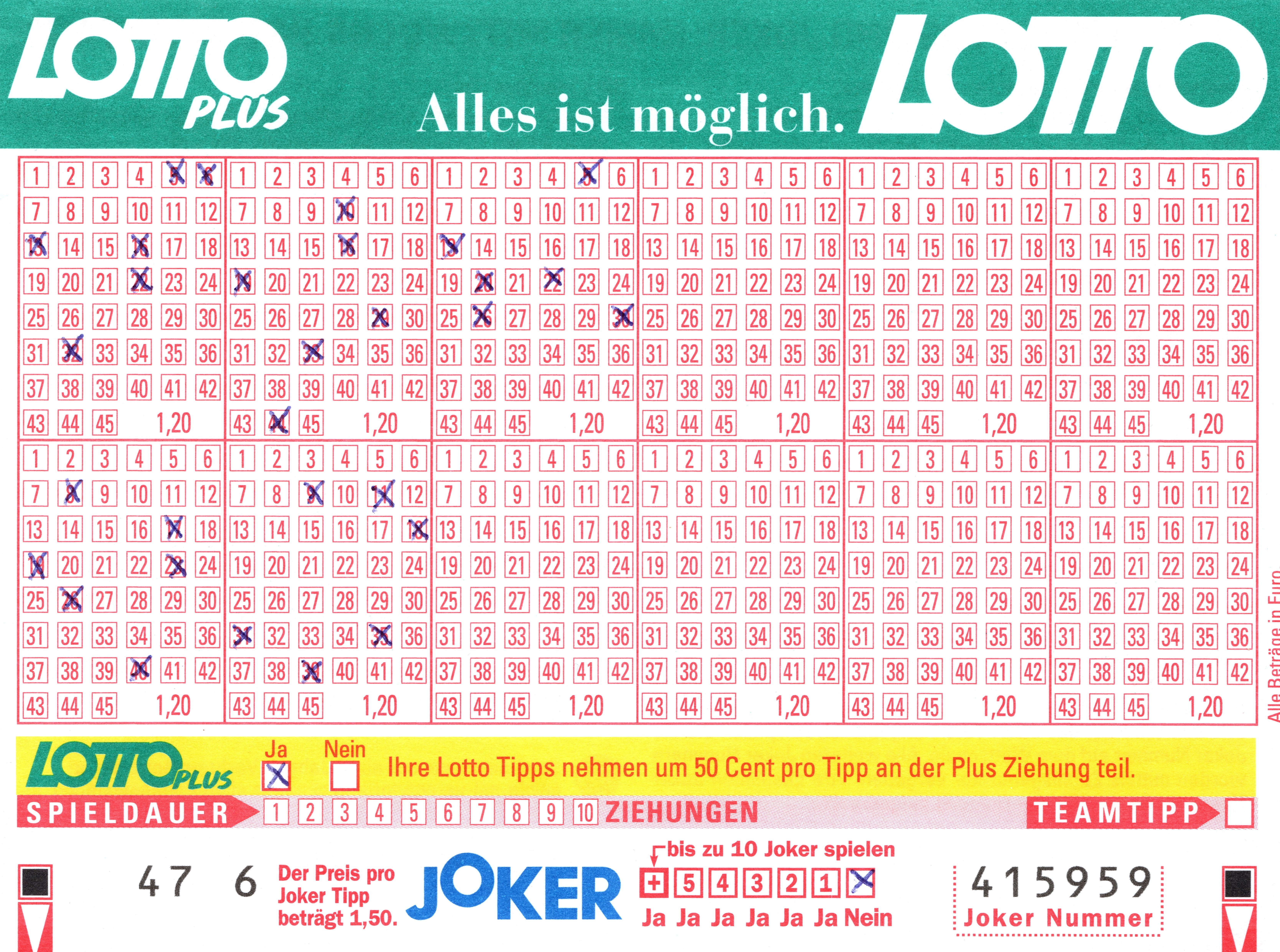 Österreichischer Lottoschein